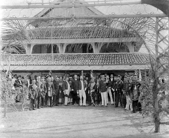 Repronegatief. Installatie van de Sultan van Siak in 1889 in aanwezigheid van resident Michielsen, overste Van der Pol en assistent-resident Schouten, Oost-Sumatra